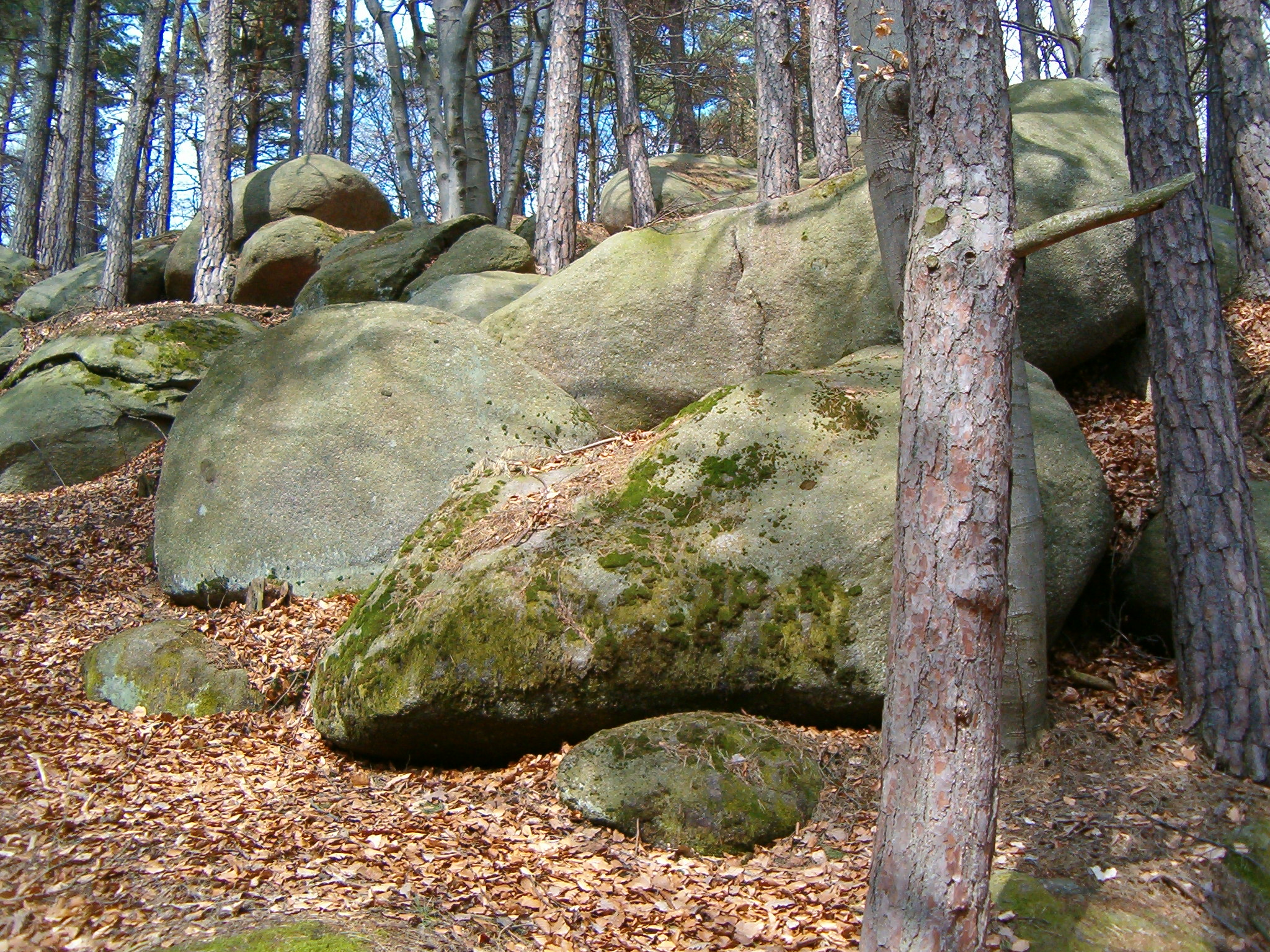 Pohled na přírodní památku v okolí obce Hrazany, kde je možno vidět doklad zalednění v minulosti v podobě kamenného pole.